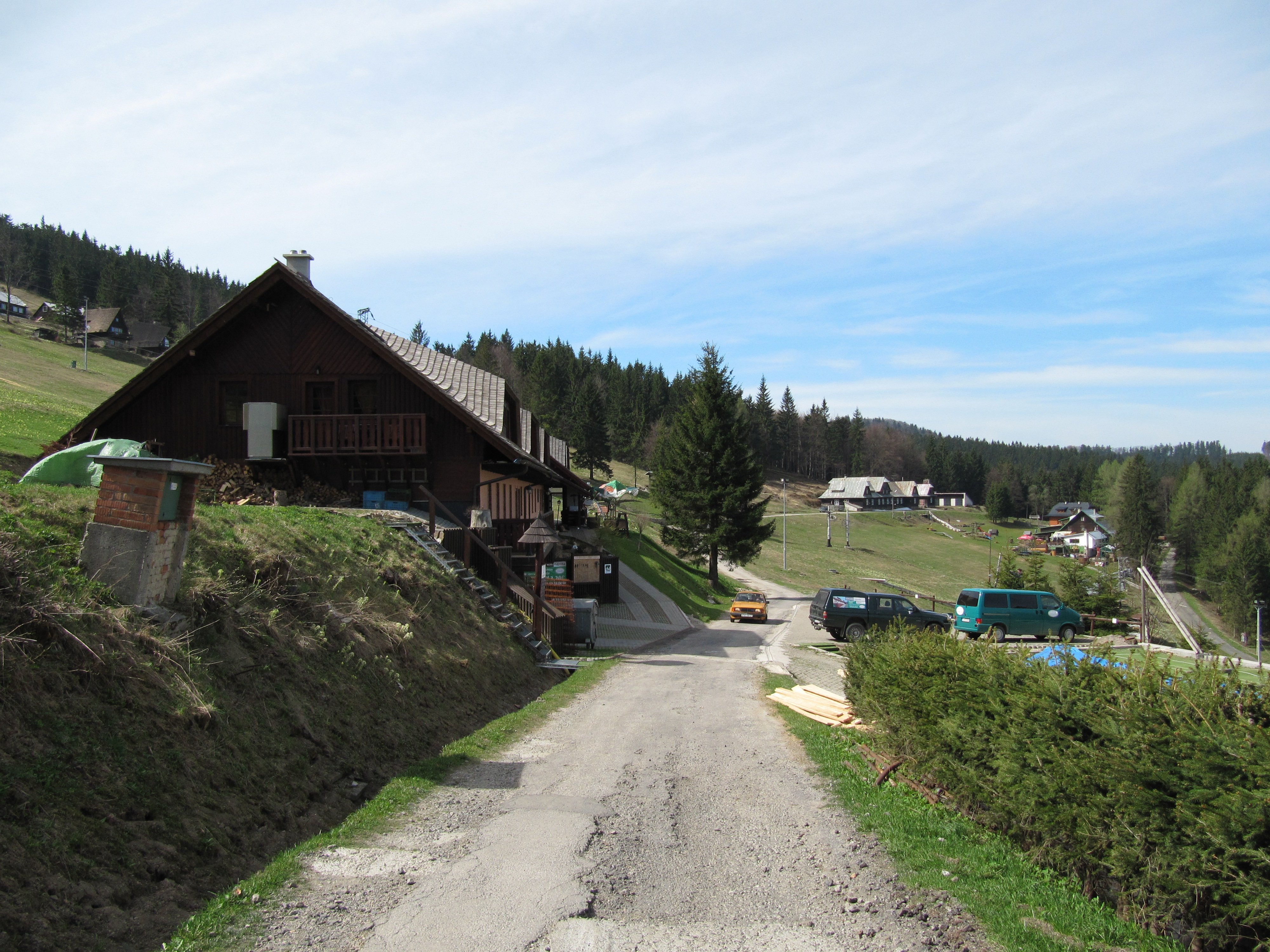 Makov, okres Čadca, Slovensko. Osada a lyžařské středisko Kasárne.